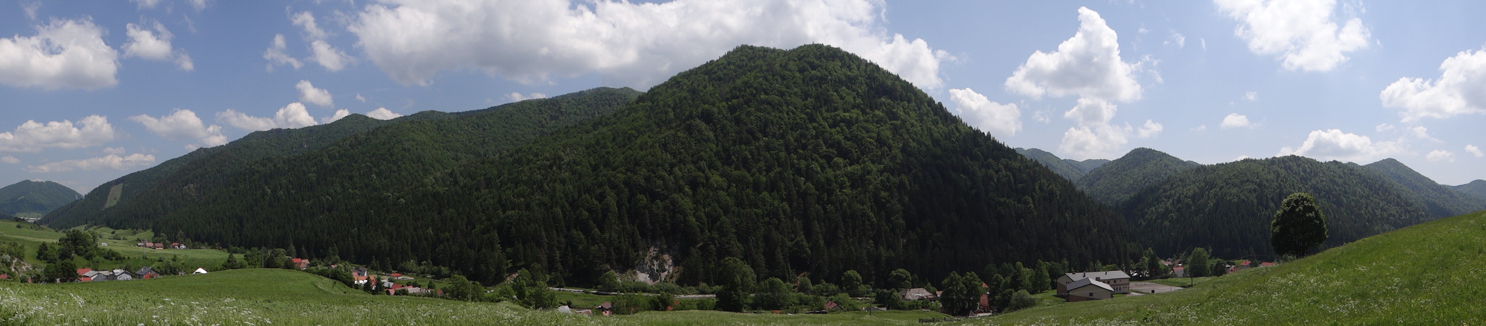 Liptovské Revúce